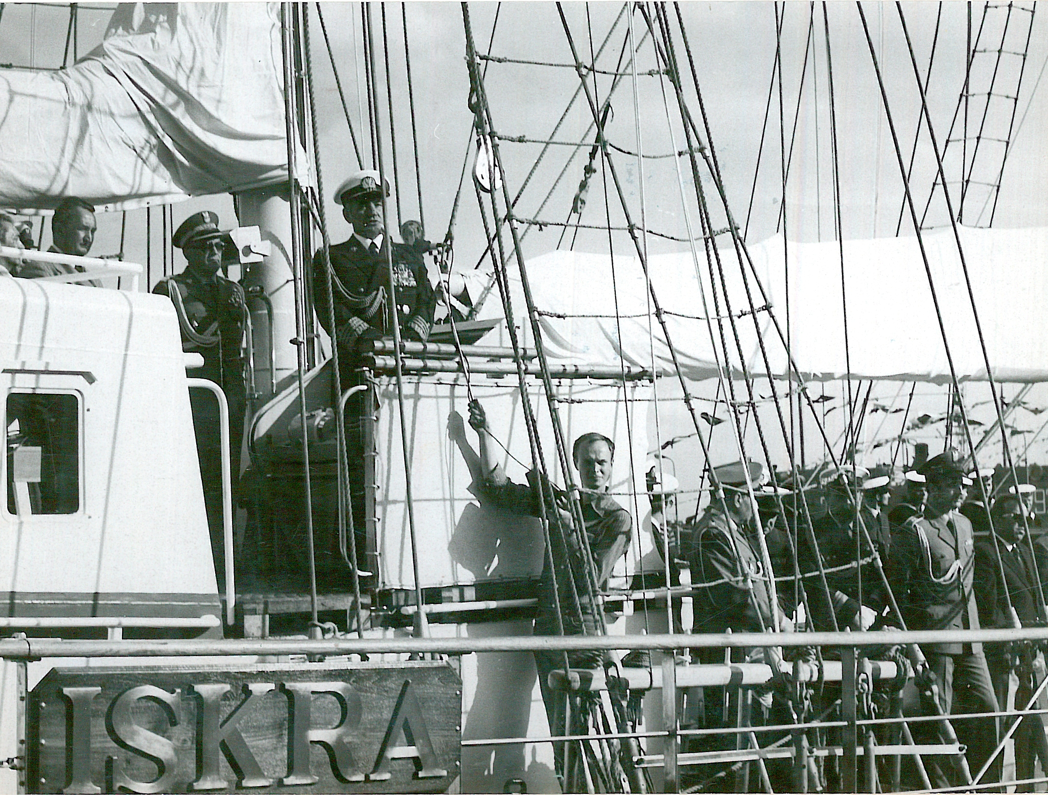 11 sierpnia 1982r-Przemówienie gen .broni F. Siwickiego i admirała L. Janczyszyn